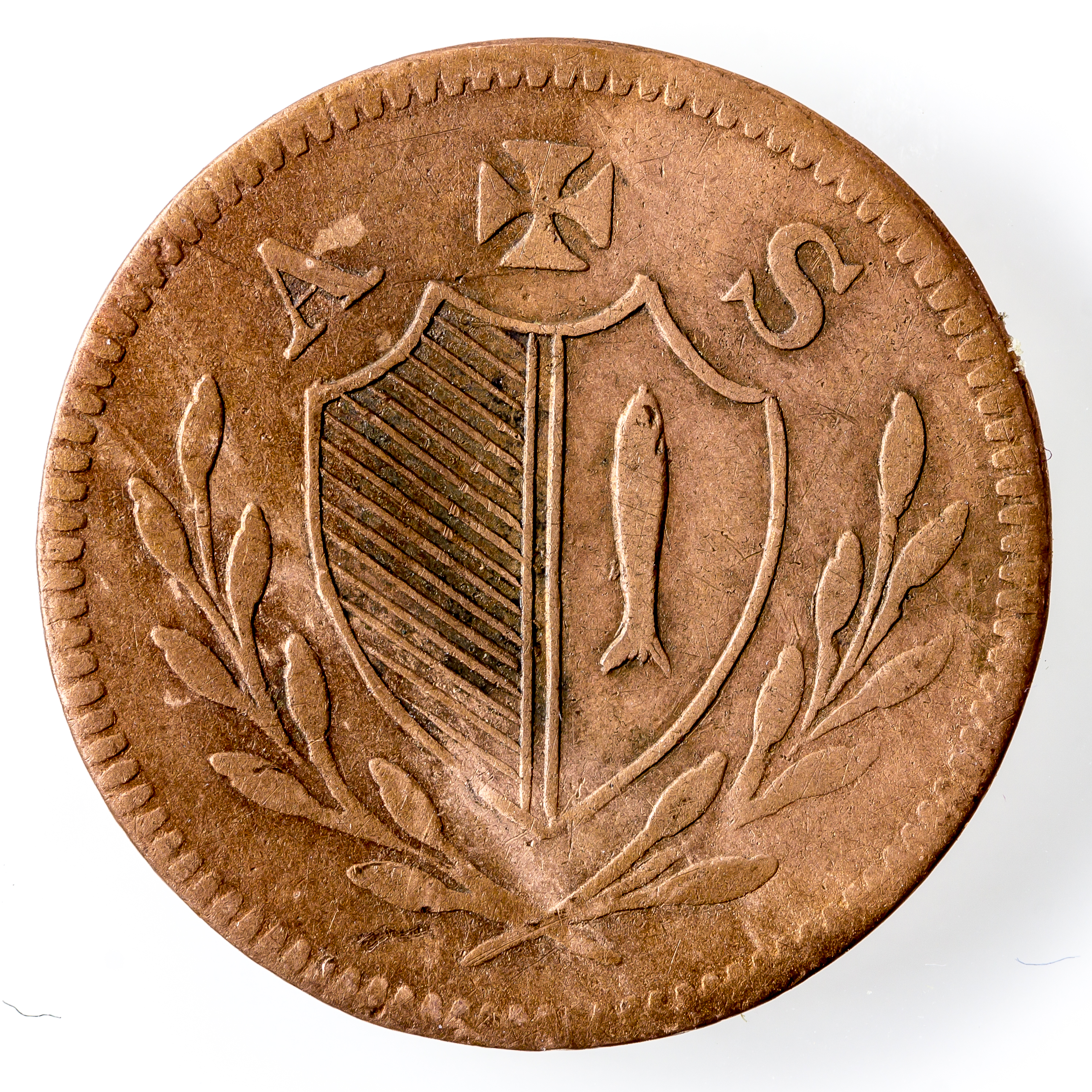 Judenpfennig 1/4 Halbag 1818